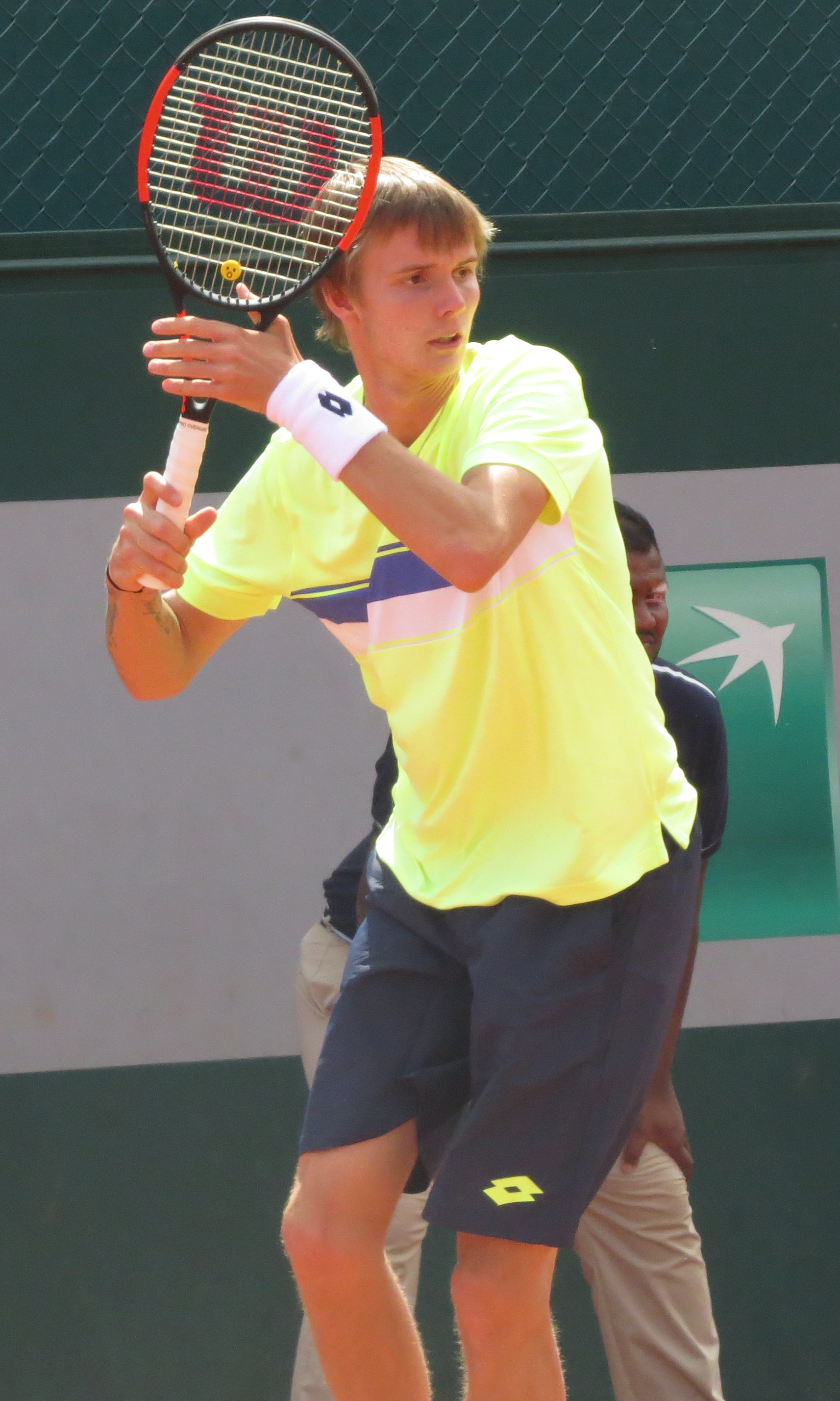 Alexander Bublik lors de son deuxième tour des qualifications face à Peter Polansky (court n°10)